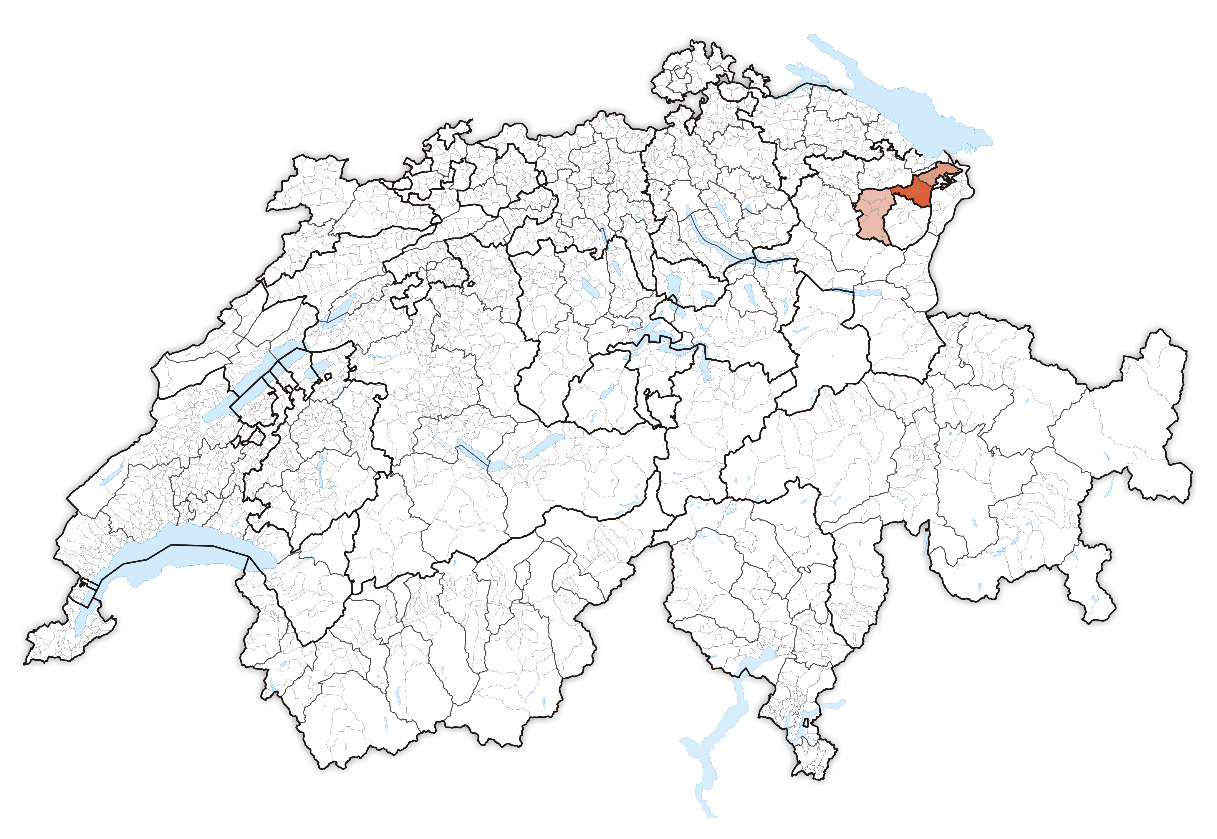 Canton Appenzell Ausserrhoden